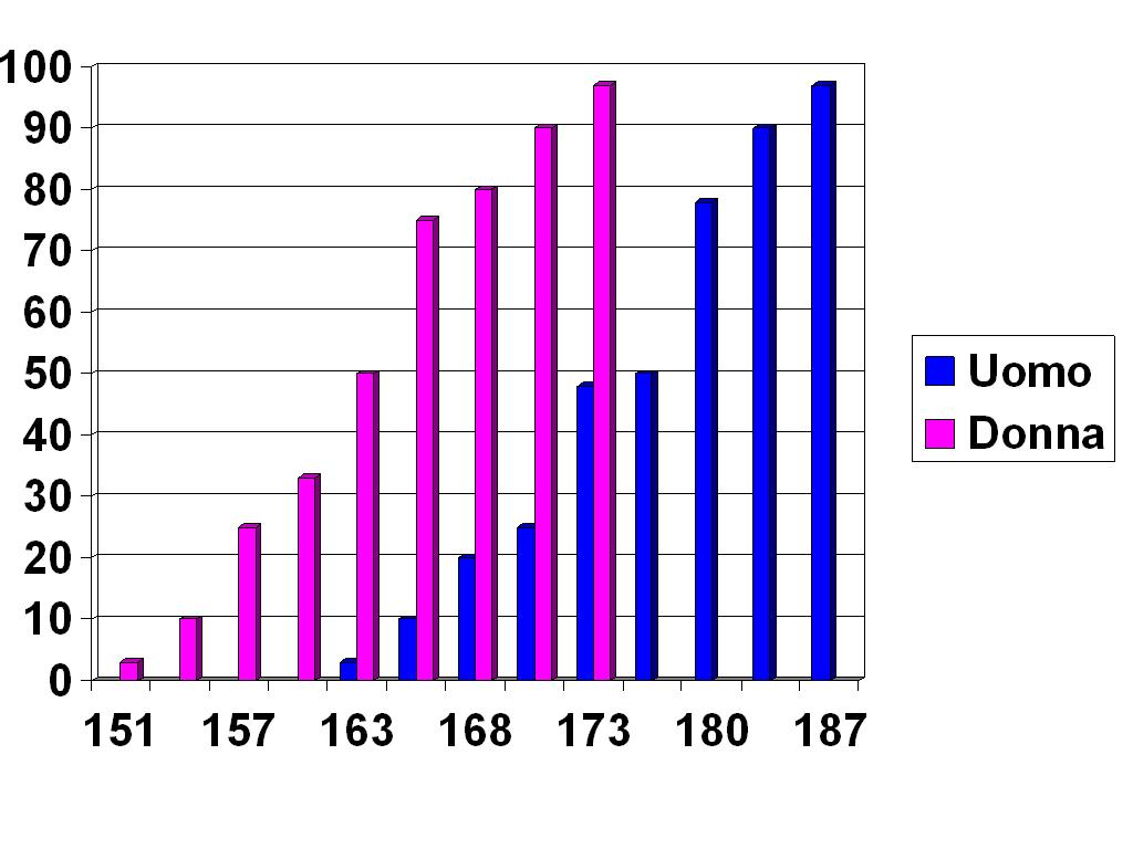 Statura